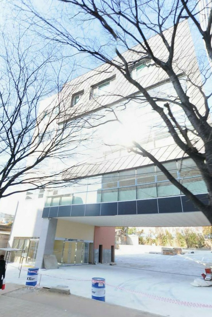 해운대시외터미널 (영남권)